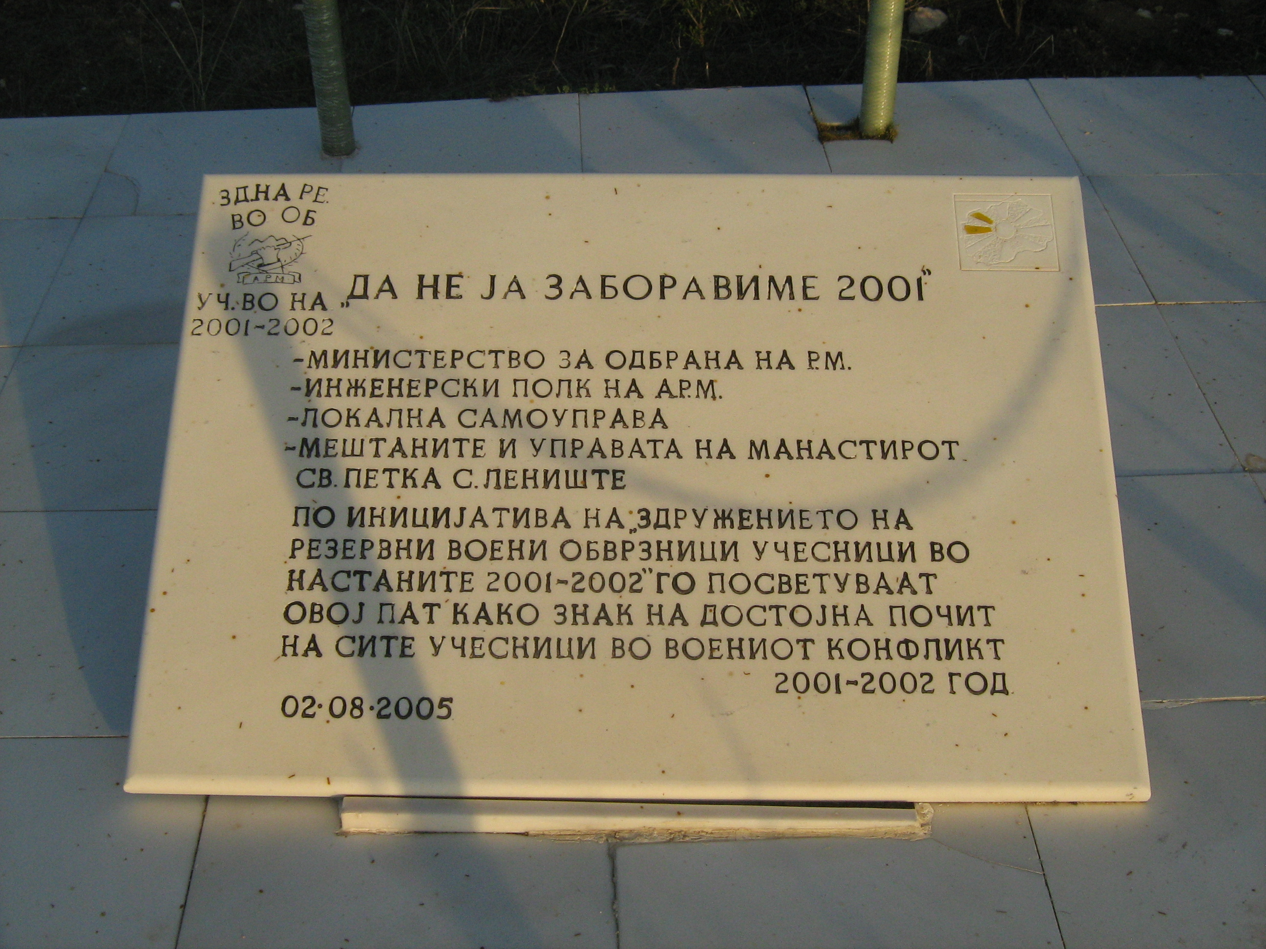 Спомен-обележје Карпалак, во Лениште, во знак на почит кон учесниците во воениот конфликт 2001-2002 во Република Македонија